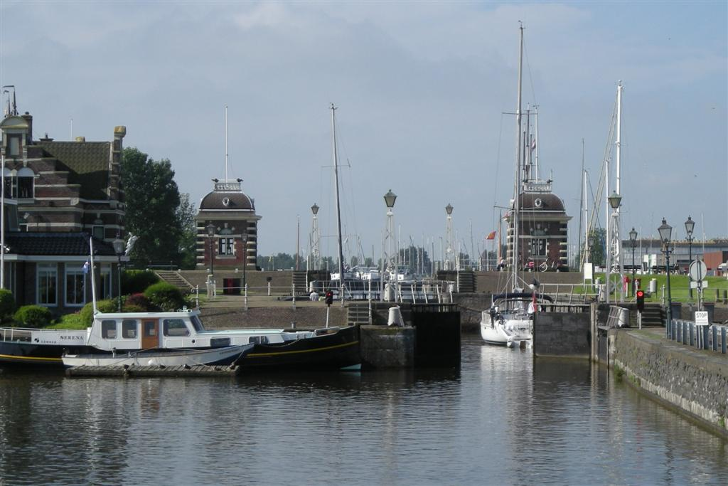 Sluis Lemmer / Canal Lock in Lemmer